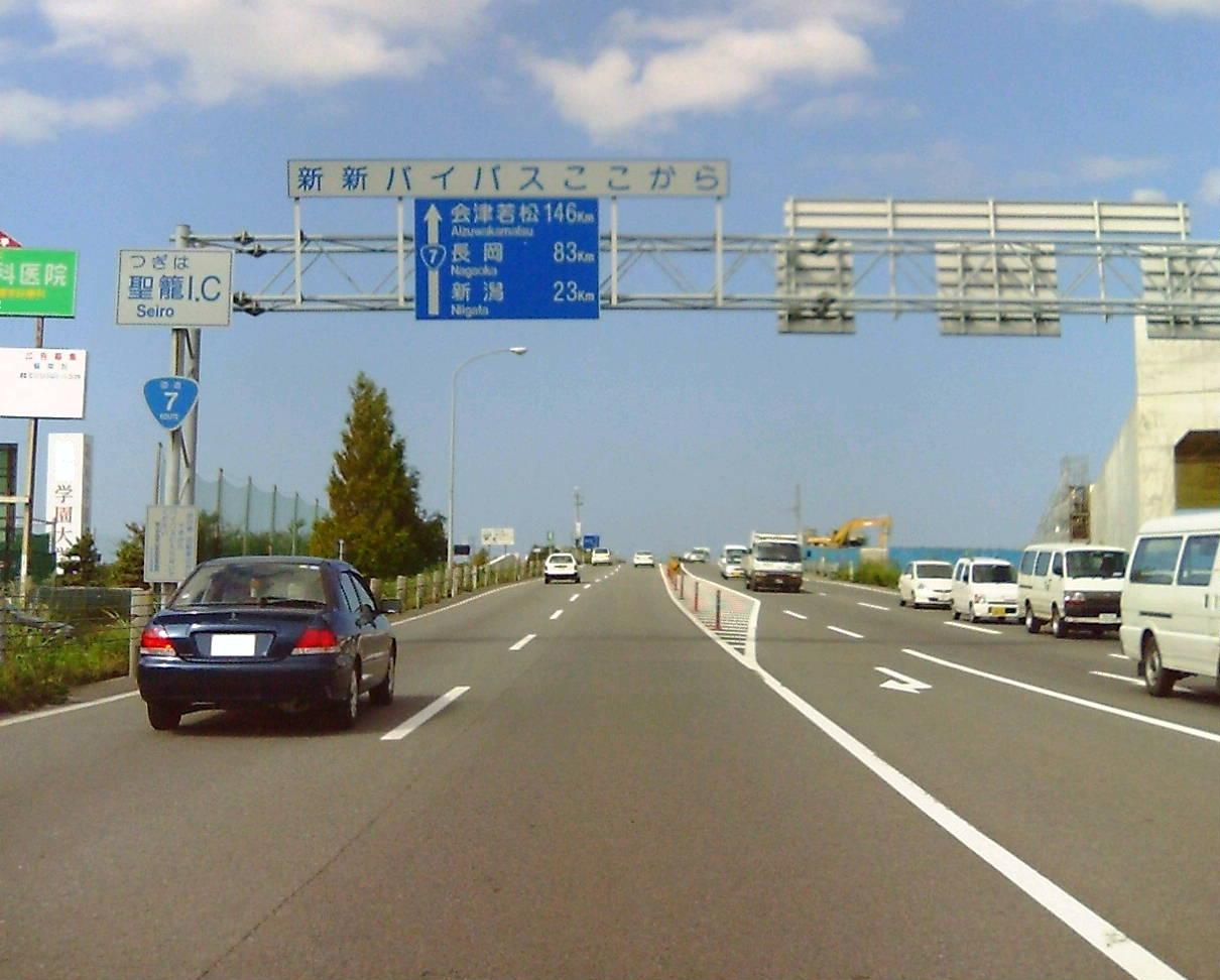 新新バイパス新発田IC。ナンバープレート及び看板の電話番号を修正してあります。